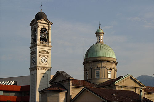 Pfarrkirche San Vitale in Chiasso